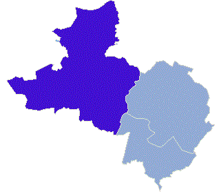 Powiat wschowski - Gmina Sława